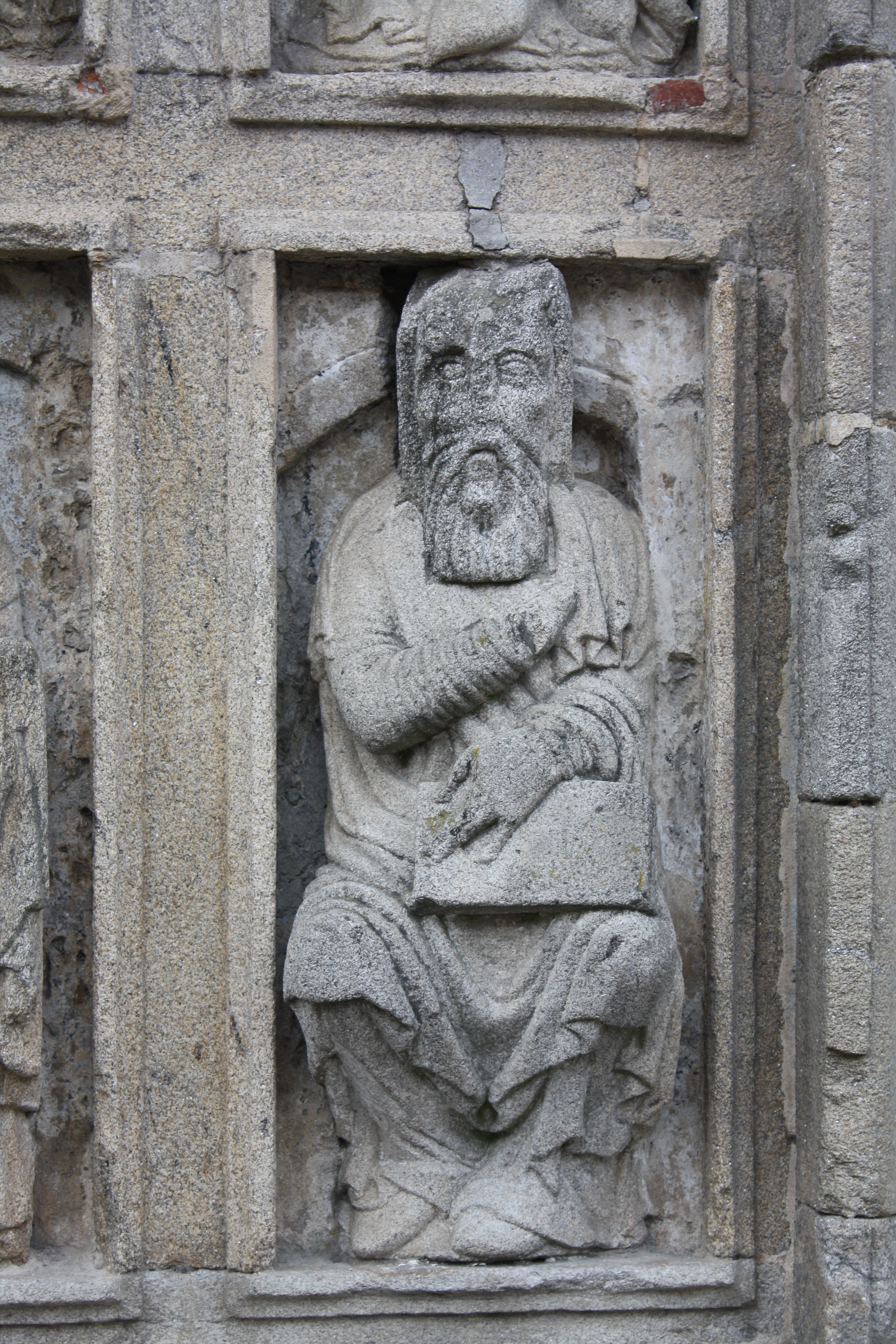 O profeta menor Nahún, na Porta Santa da Catedral de Santiago de Compostela.